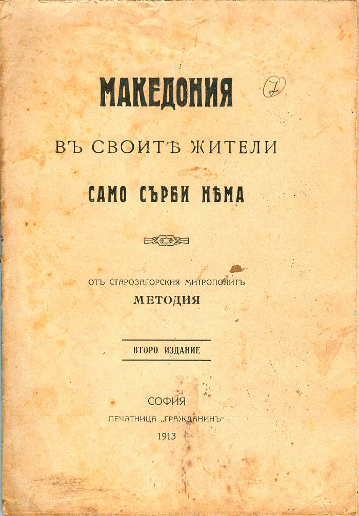 Корица на "Македония в своите жители само сърби няма" на старозагорския митрополит Методий Кусев.